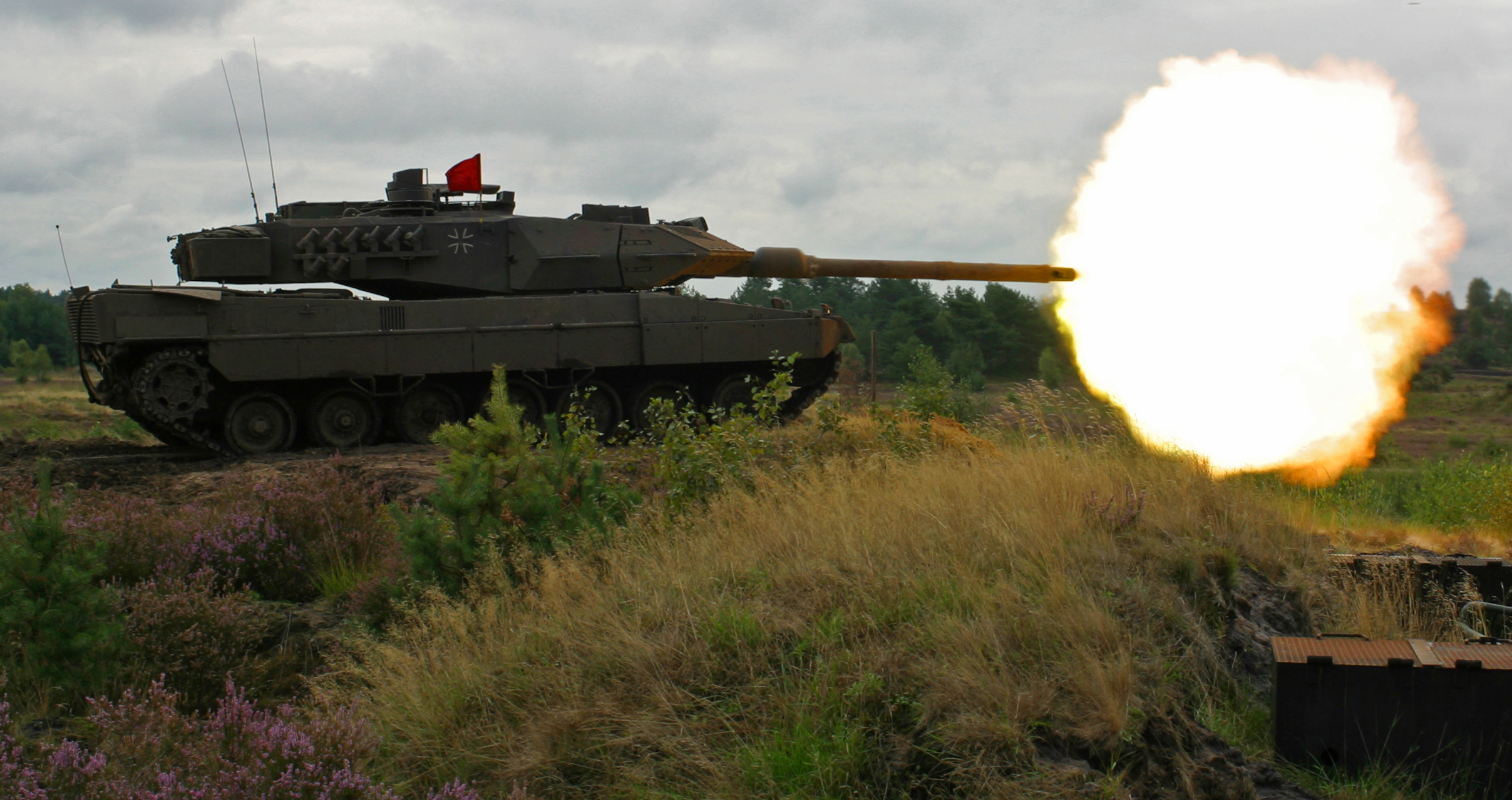 Der Kampfpanzer Leopard 2 A6 beim Vorüben der Informationslehrübung Heer am Ausbildungszentrum Munster beim scharfen Schuss. ©Bundeswehr/Langner